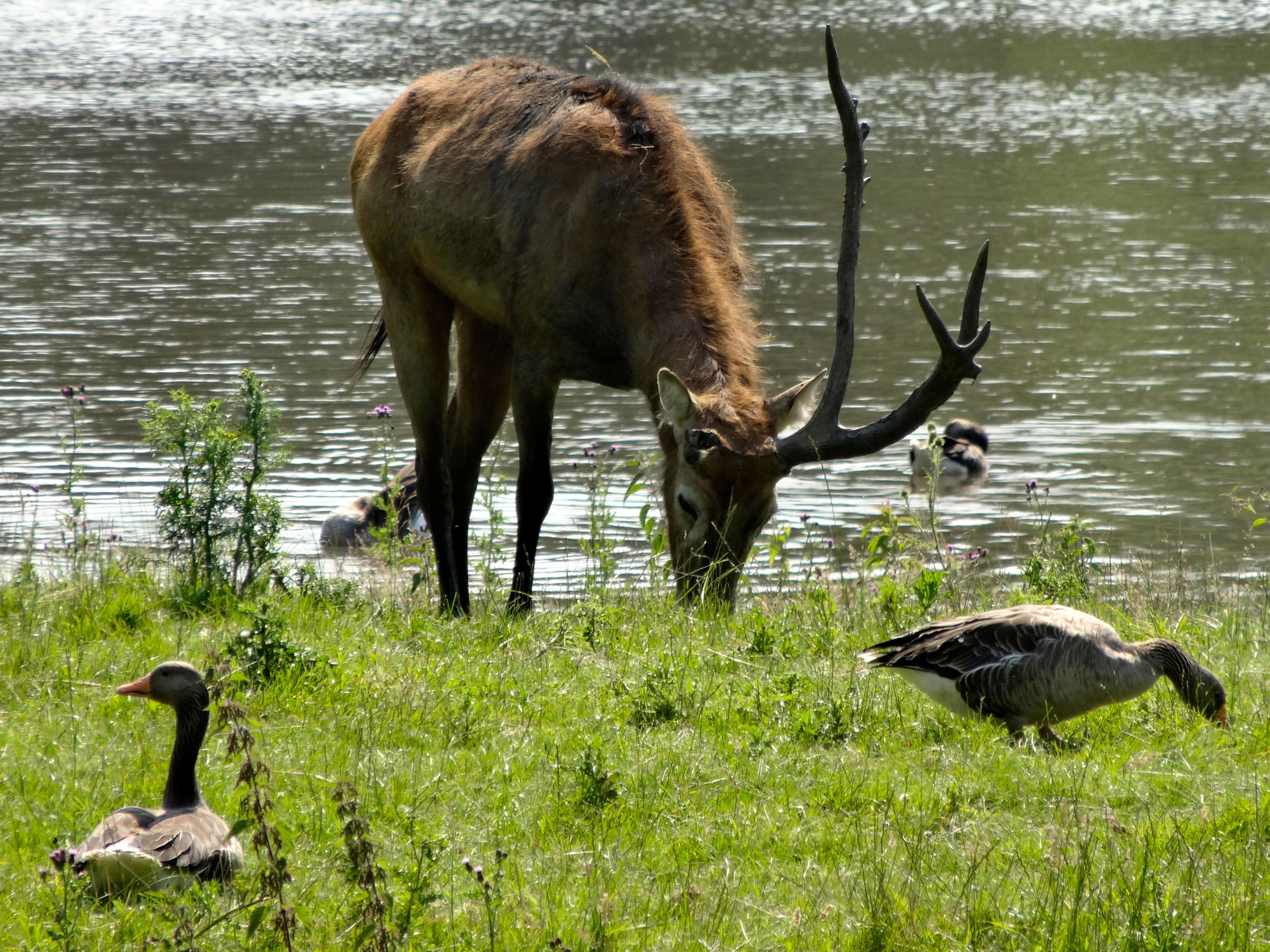 Pater Davishert en ganzen Natuurpark Lelystad